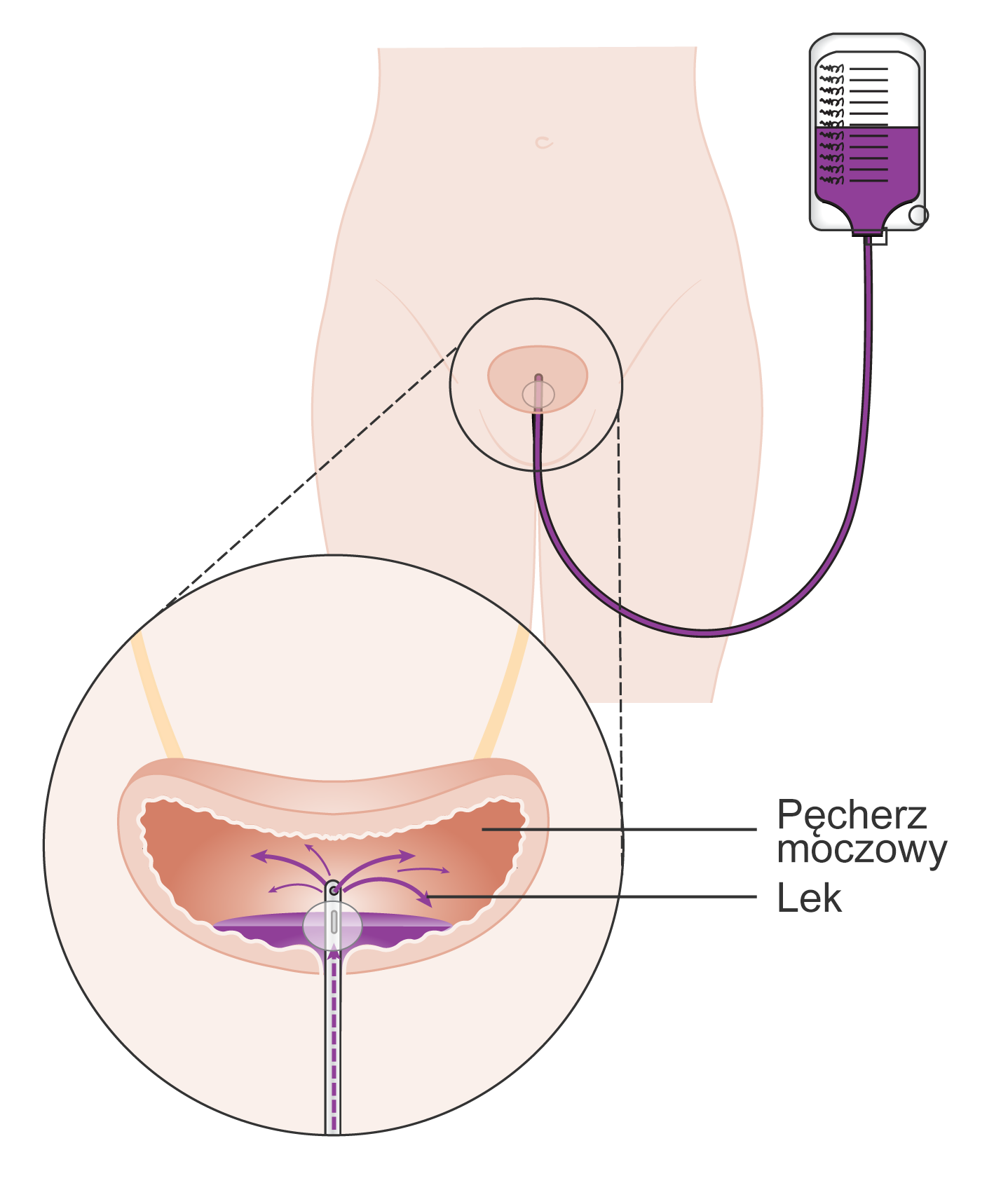 Schemat przedstawiający farmakoterapię w pęcherzu.